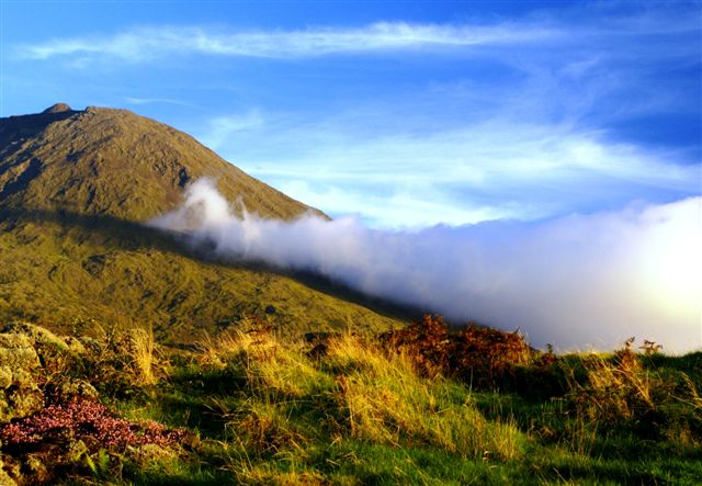 As nuvens galgam a Montanha do Pico, ilha do Pico, Açores